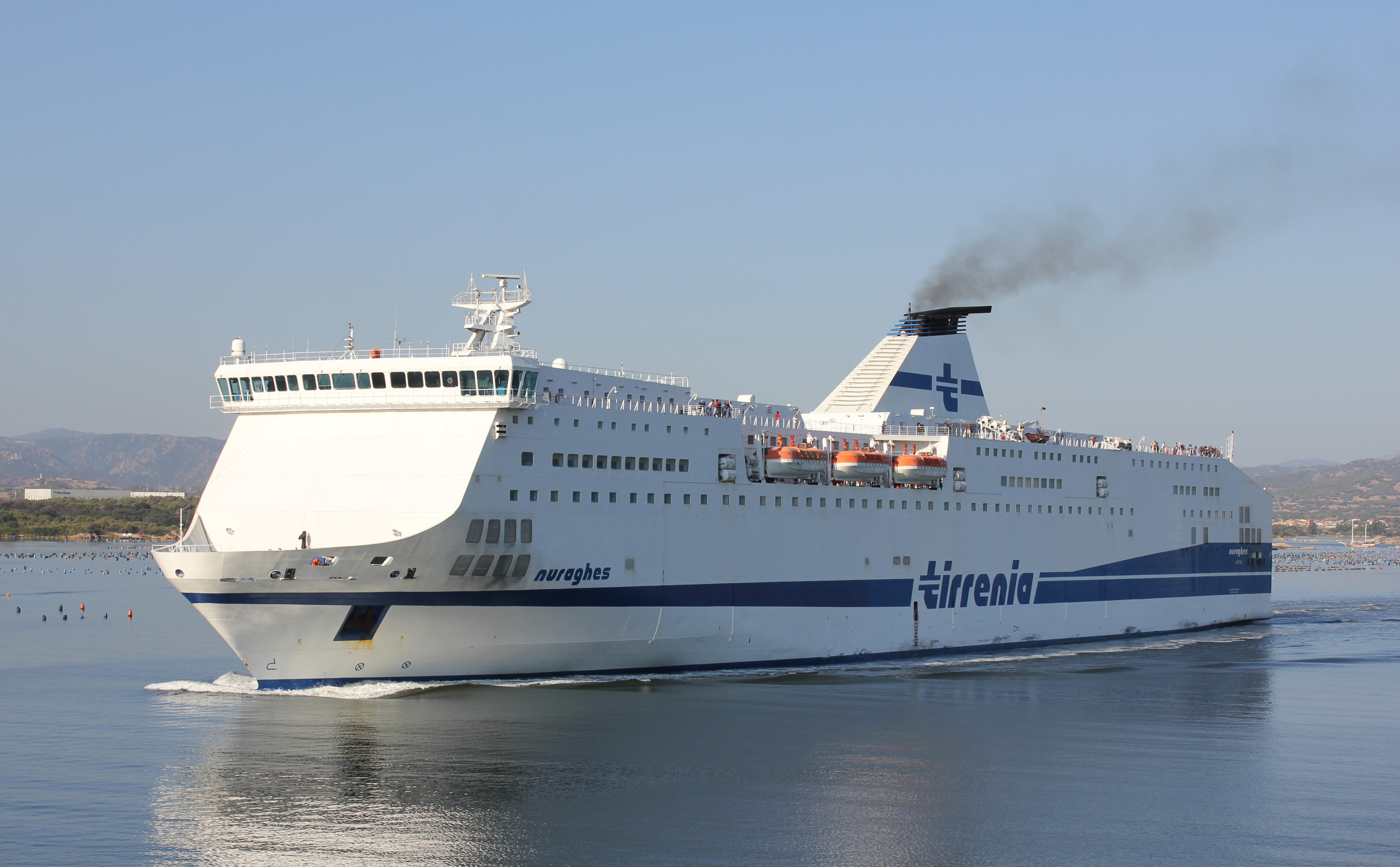 Traghetto passeggeri Nuraghes in partenza dal porto di Olbia per una traversata diurna verso Civitavecchia